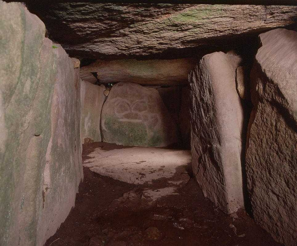 Chambre Dolmen du Mané Lud à Locmariaquer